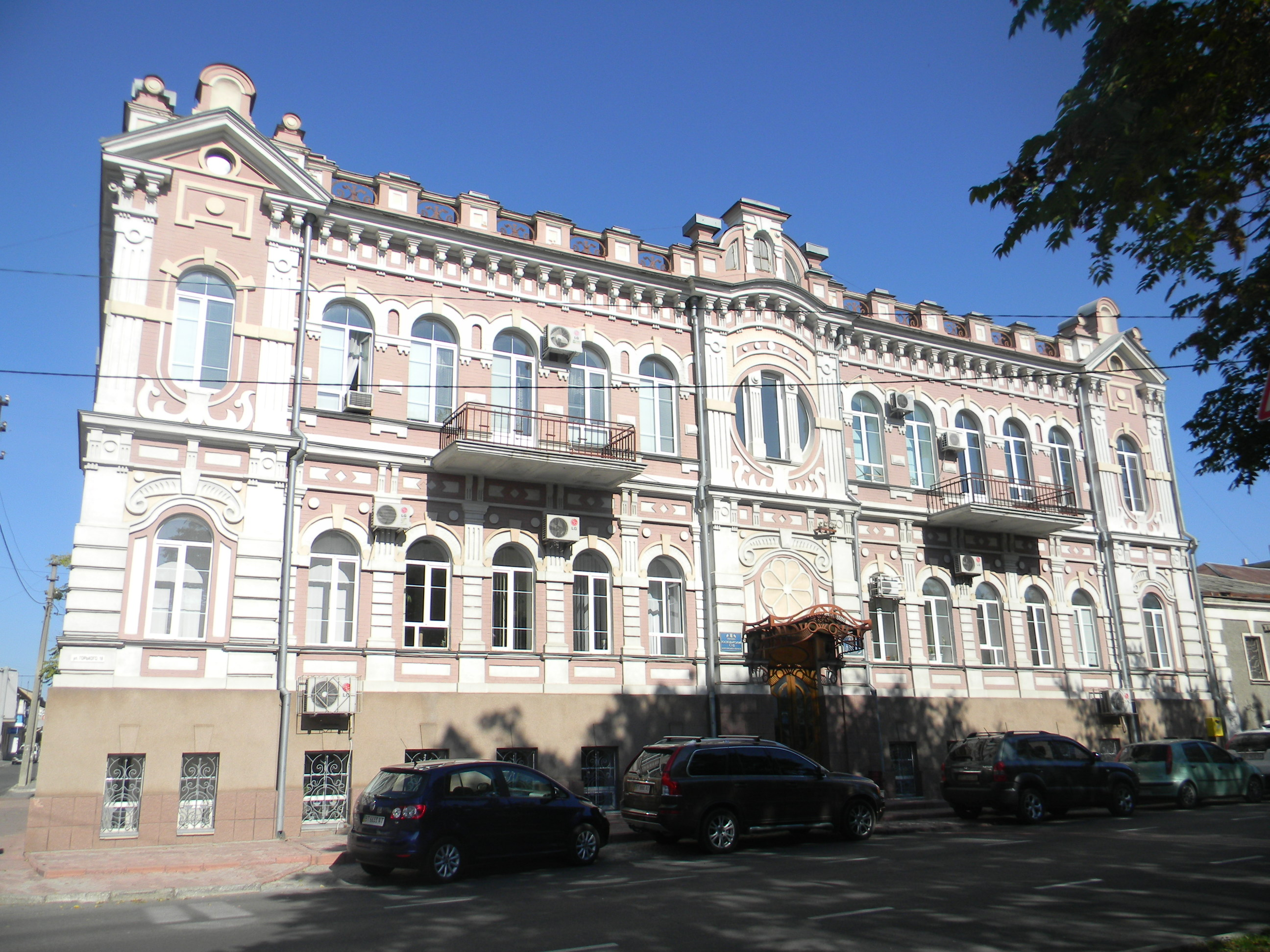 Адміністративний будинок, Херсон, вул. Горького, 18